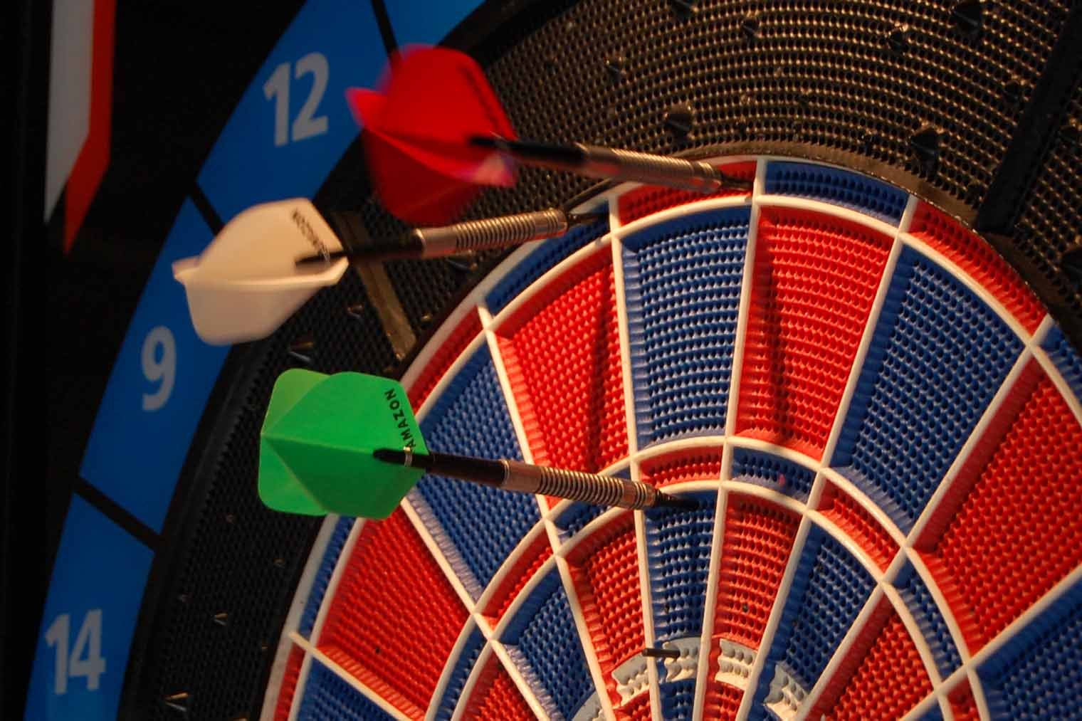 Bersaglio e Freccette da Soft Dart